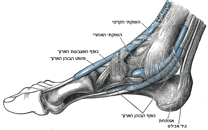 מעטפות גידים סינוביאליות בצד תיכון של כף רגל ימין